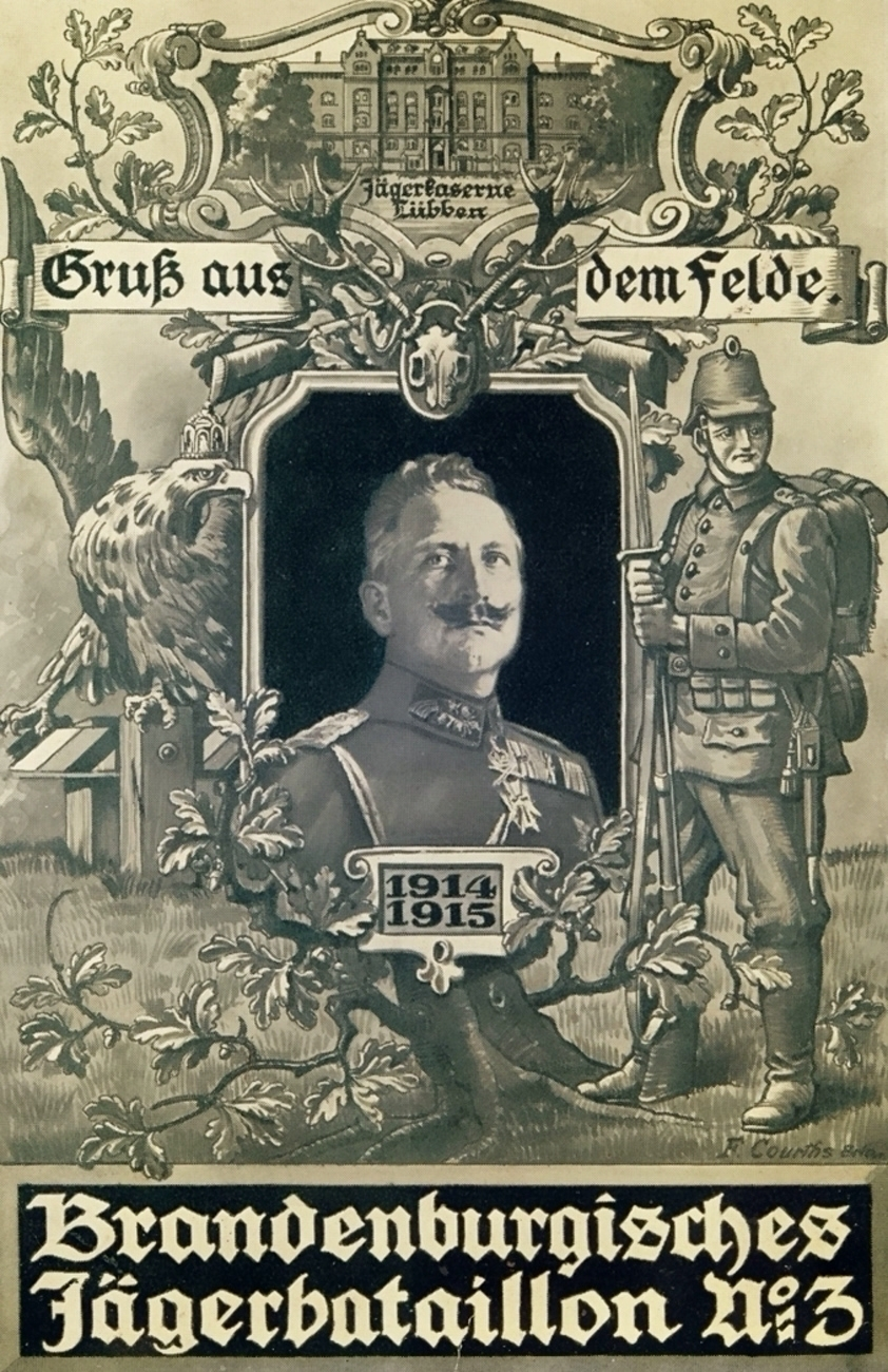 Künstler-Feldpostkarte des Brandenburgisches Jäger-Bataillon Nr. 3.